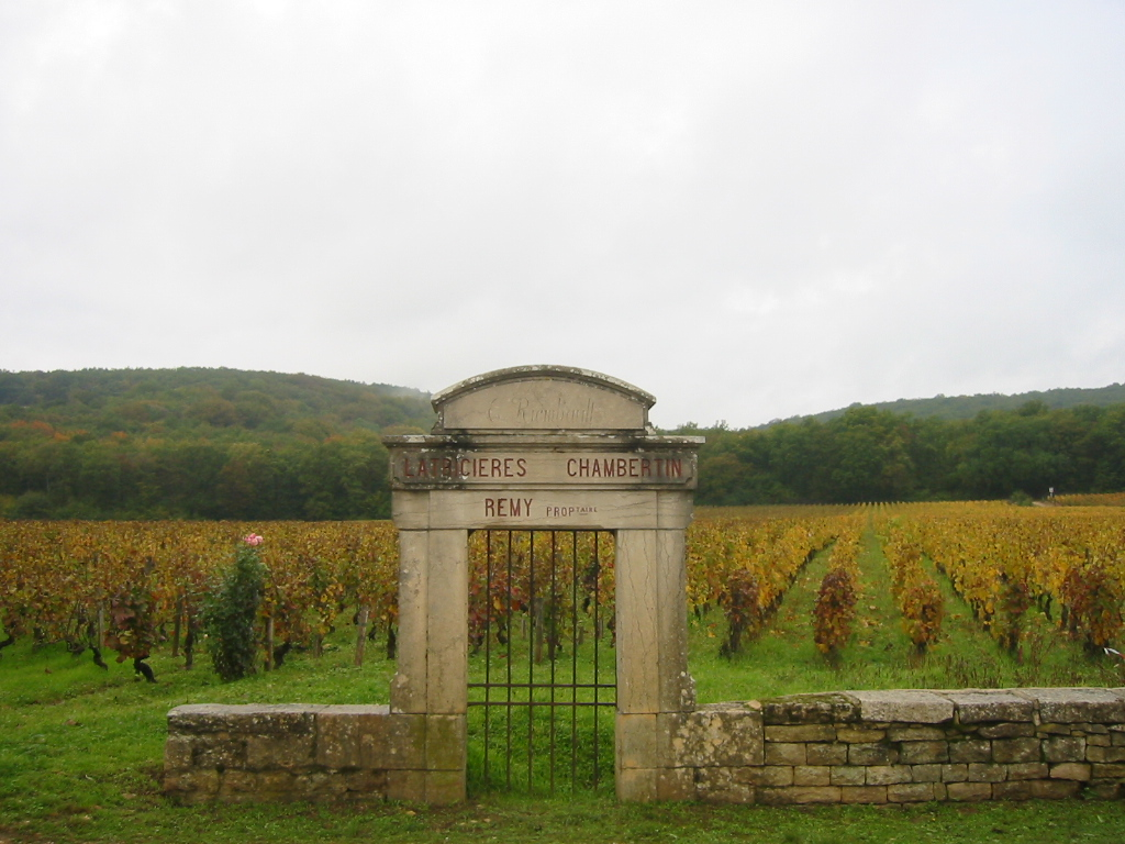 Clos des Latricières. Appelation Gevrey Chambertin Grand cru AOC